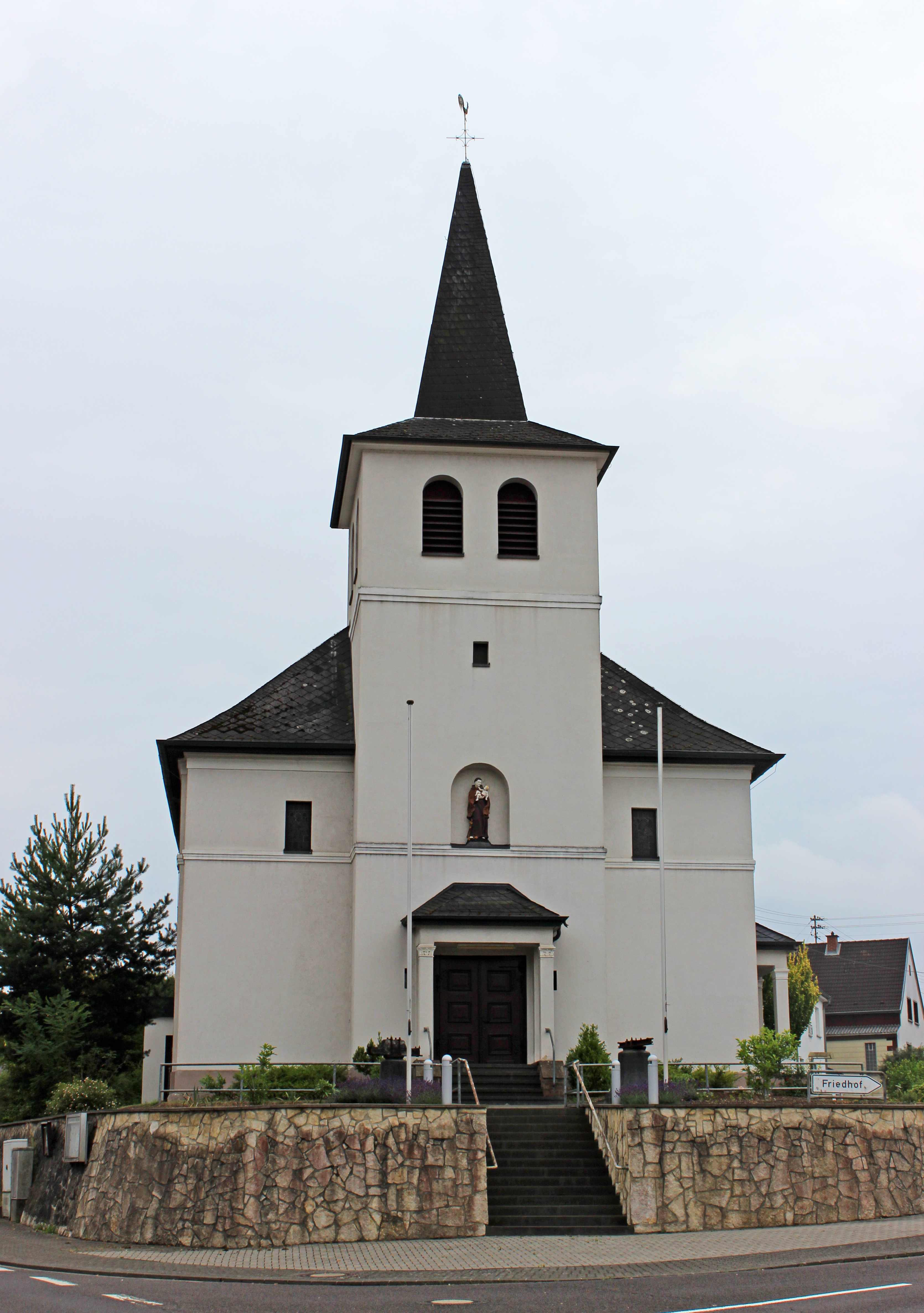 Die katholische Pfarrkirche St. Antonius in Werbeln, Gemeinde Wadgassen, Landkreis Saarlouis, Saarland